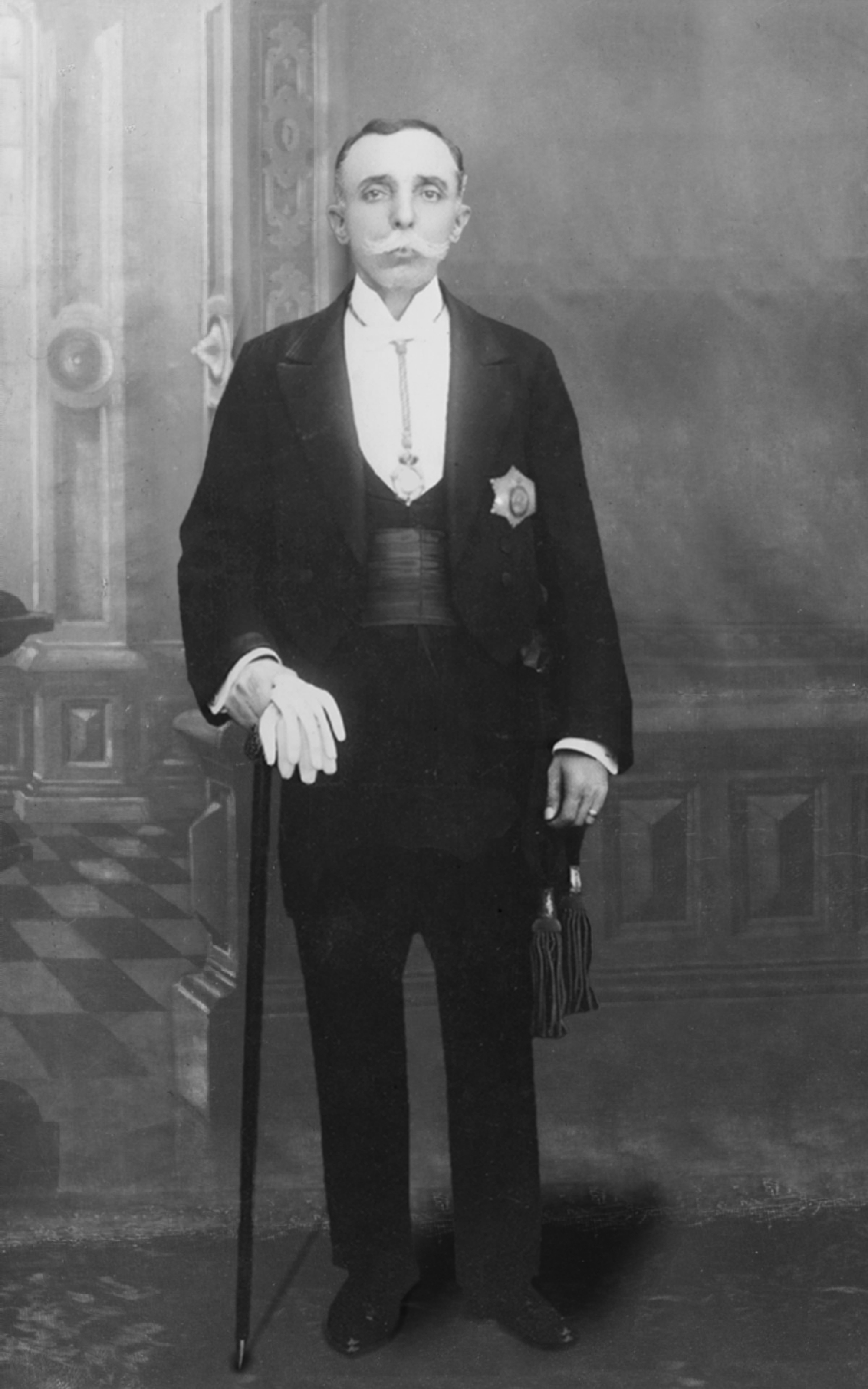 Ilmo. Sr. D. Félix Antonio del Granado Tardío, IV conde de Cotoca